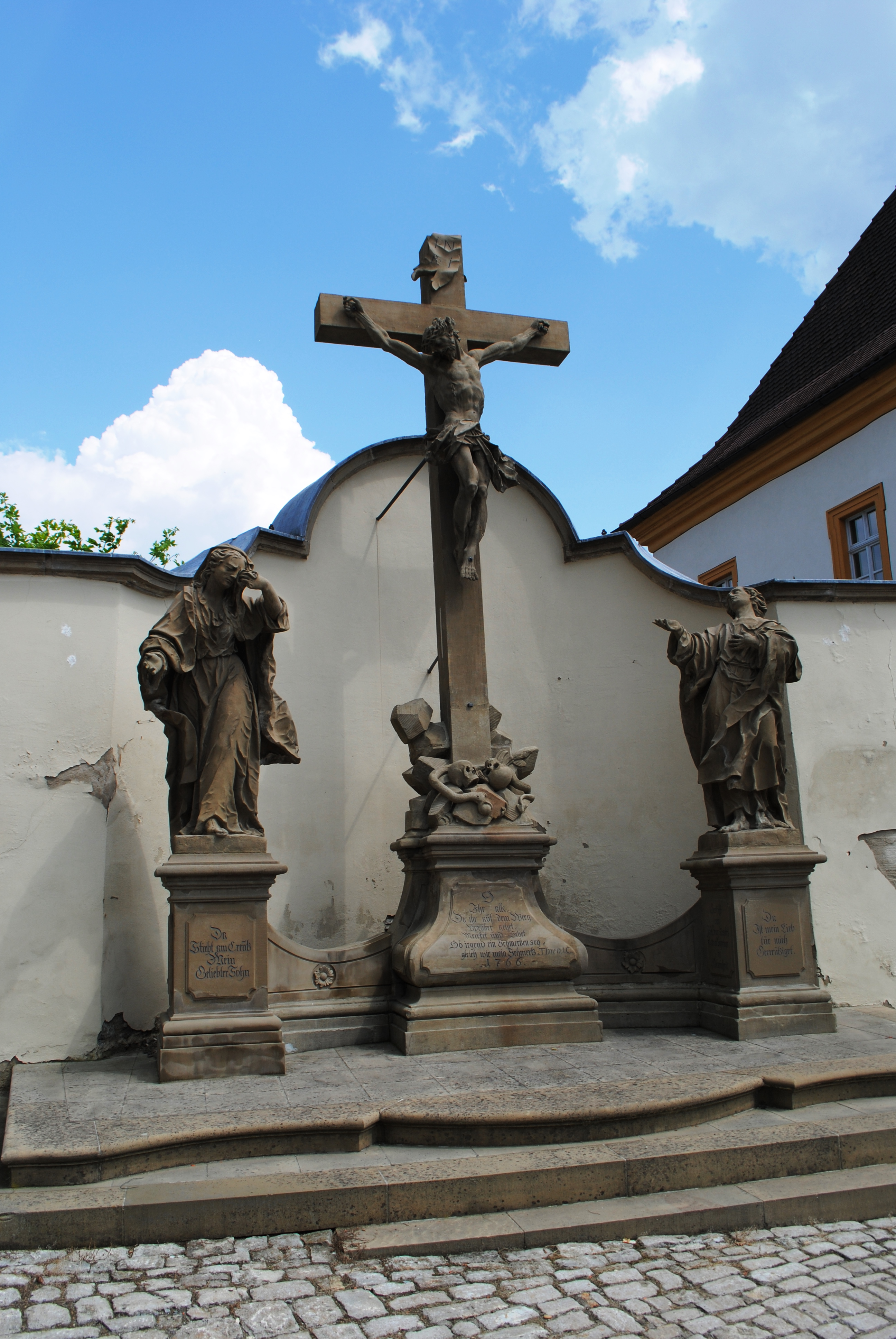 Kreuzigungsgruppe, Wiesentheid, D-6-75-178-38